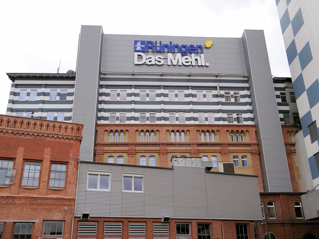 Nordseite der Mühlengebäude während der 700-Jahr-Feier im Juni 2012.